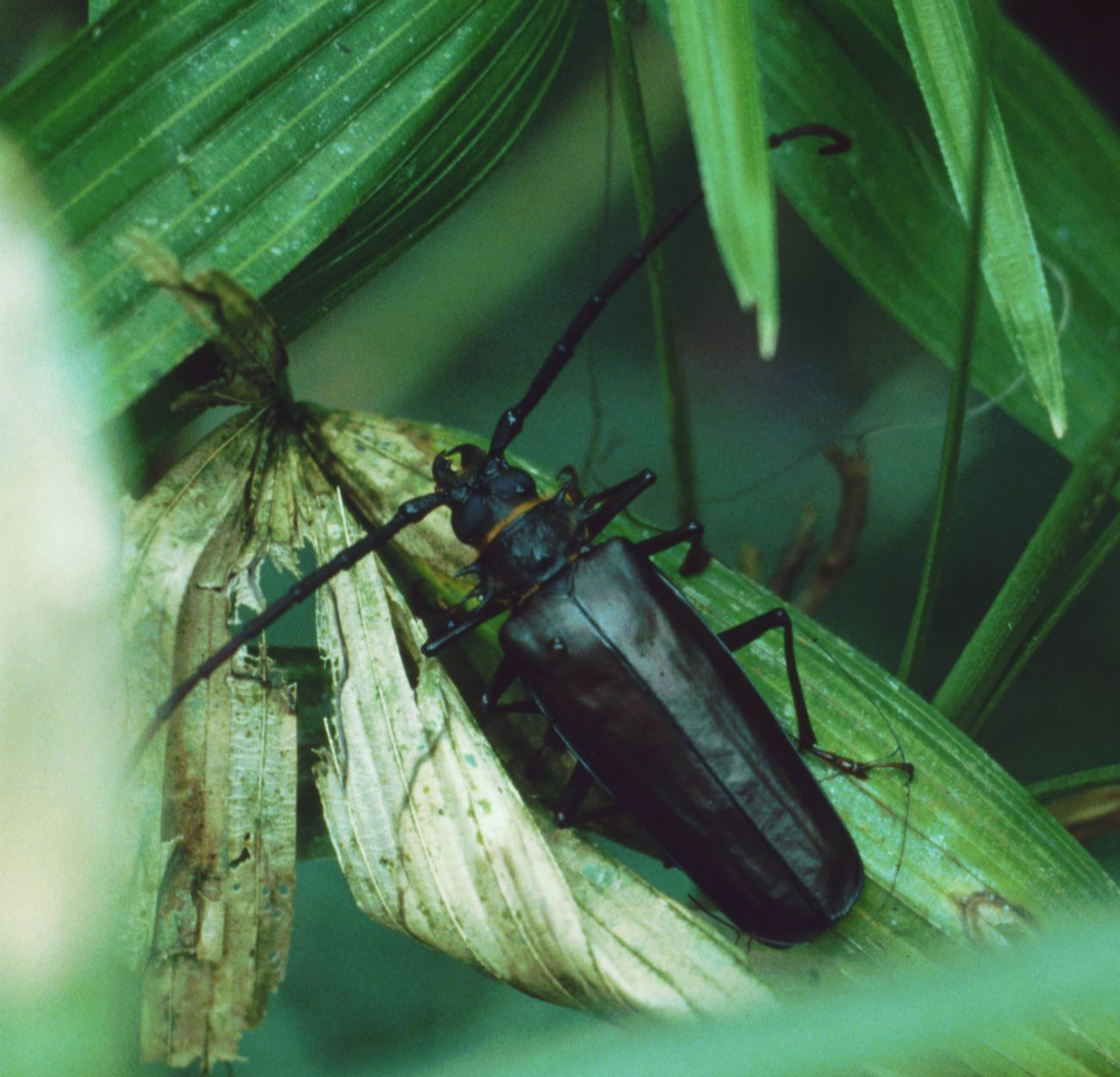 Derobrachus longicornis, Bockkäfer (Cerambycidae) Prioninae, - Costa Rica: Fila Costeña S San Vito, Wilson Gardens (Prov. Puntarenas)